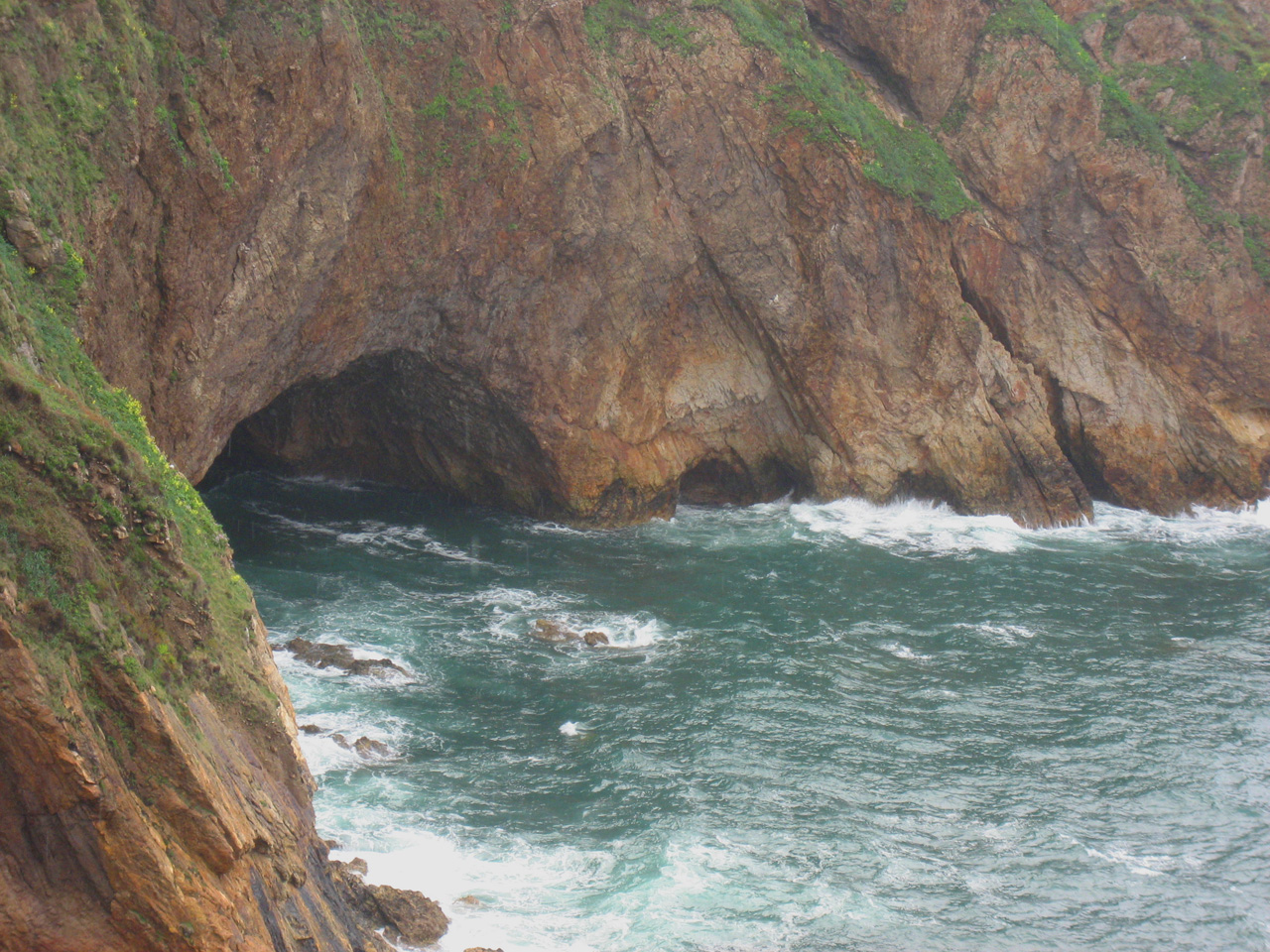 Gruta en la Campa Torres, en Gijón.